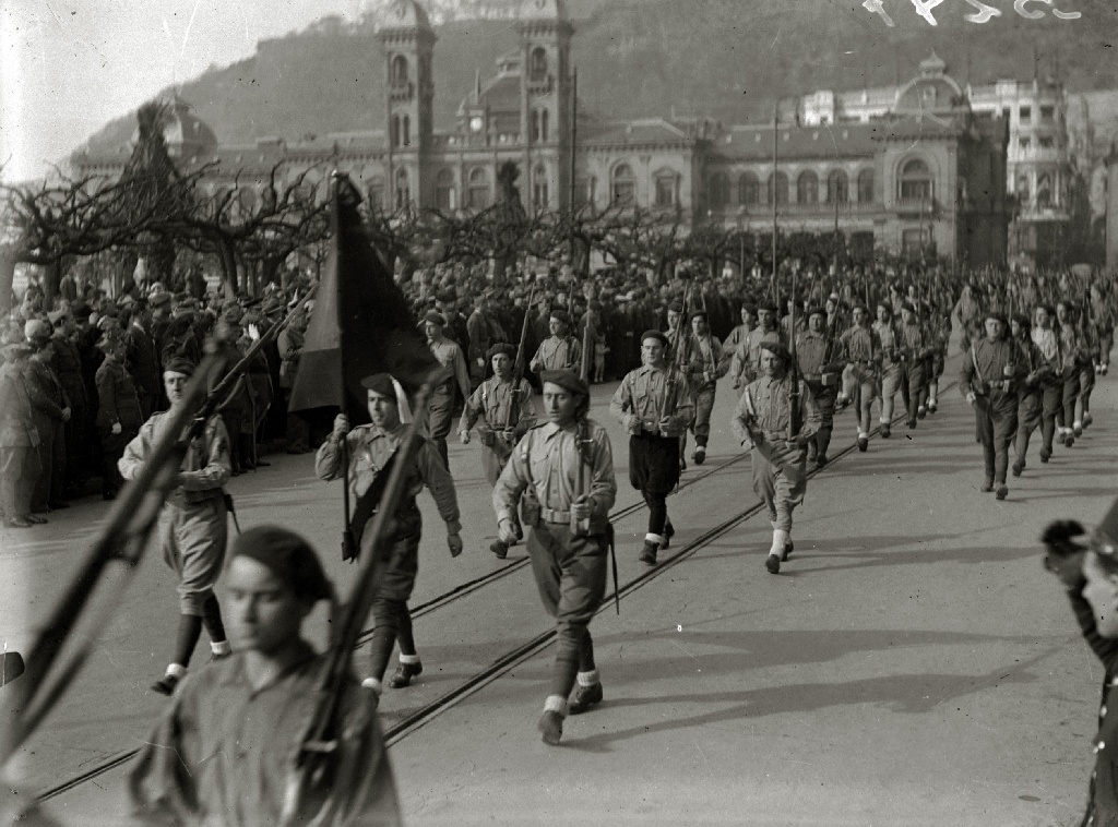 Título original: Desfiles militares (3/8) Localización: San Sebastián (Guipúzcoa)